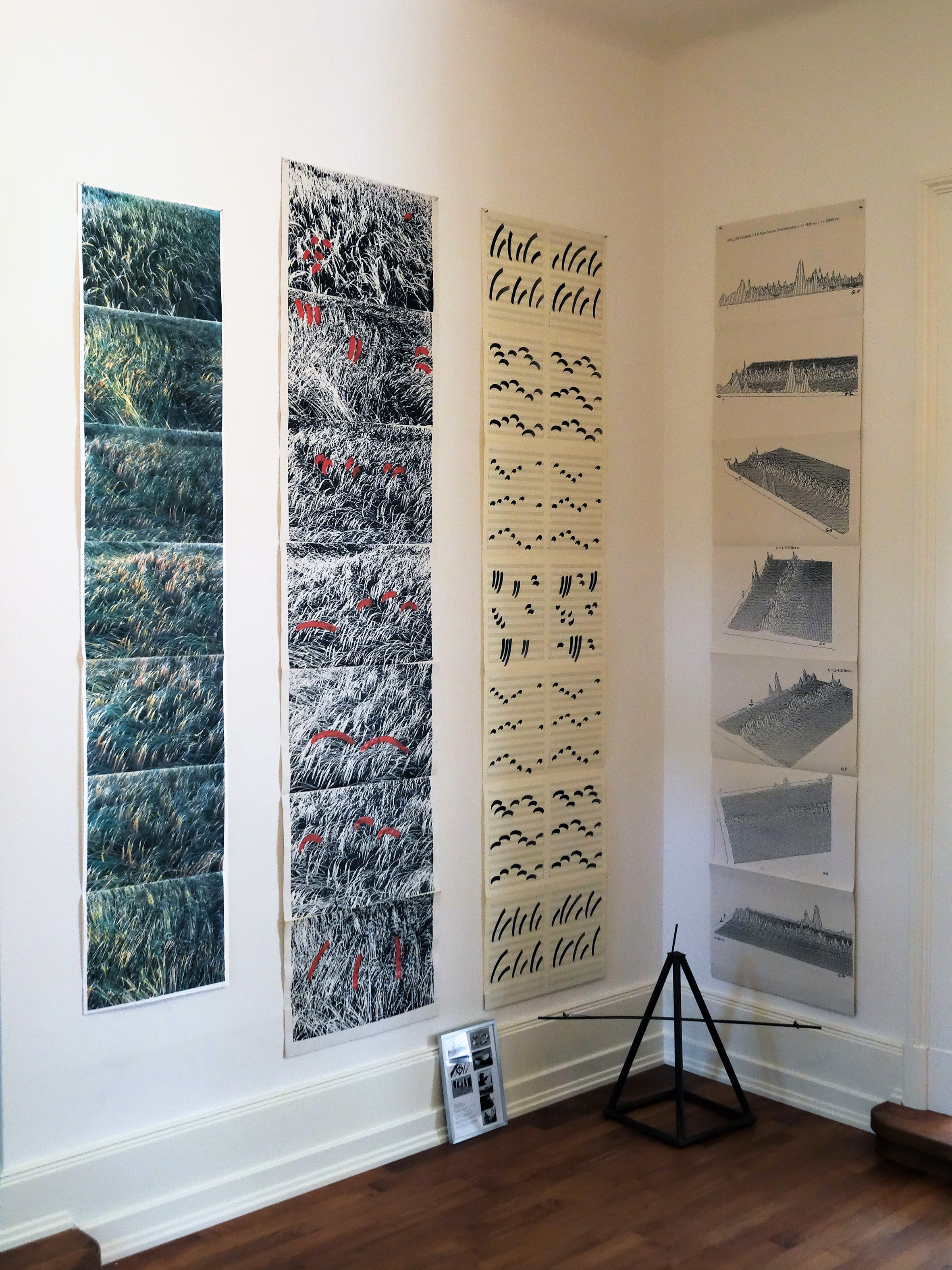 2012 - „Getreide“, 4-teiliger Ausschnitt der 28-teiligen Bildarbeit „TRANSART / 7x7 Neuenkirchen“, op. 87 / 1994, Fotografie von Wittwulf Y Malik in einer Ausstellung in der Agentur für zeitgenössische Kunst, 2012